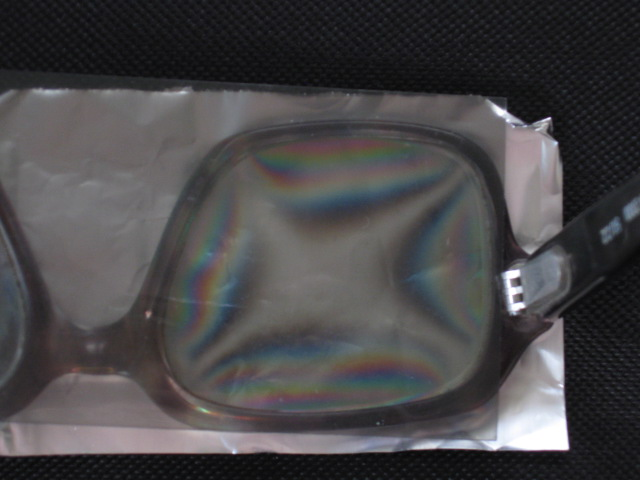 משקפיים בפולריסקופ החזרה מאולתר